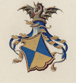 stemma della famiglia Guidi di Bagno